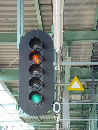 Railway signal in japan, Odakyu Shimokitazawa sta., zero block